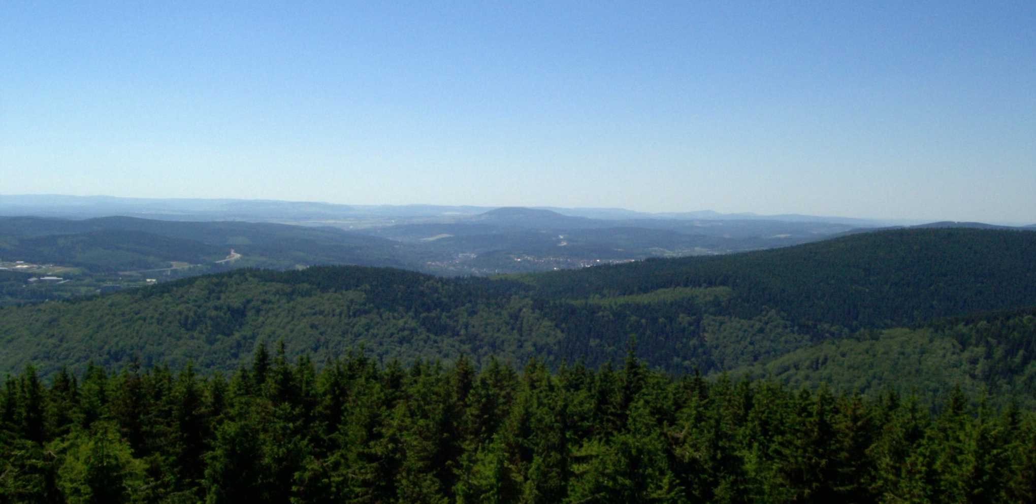 Blick vom Adlersberg (849 m) auf die Stadt Suhl und den Dolmar (740 m, 21 km entfernt) bei Meiningen. Im Vordergrund der Große Dröhberg (ca. 730 m, links) und der Beerberg (808 m, rechts), die ebenfalls zum Adlersberg-Massiv zählen; im Hintergrund die Rhön.